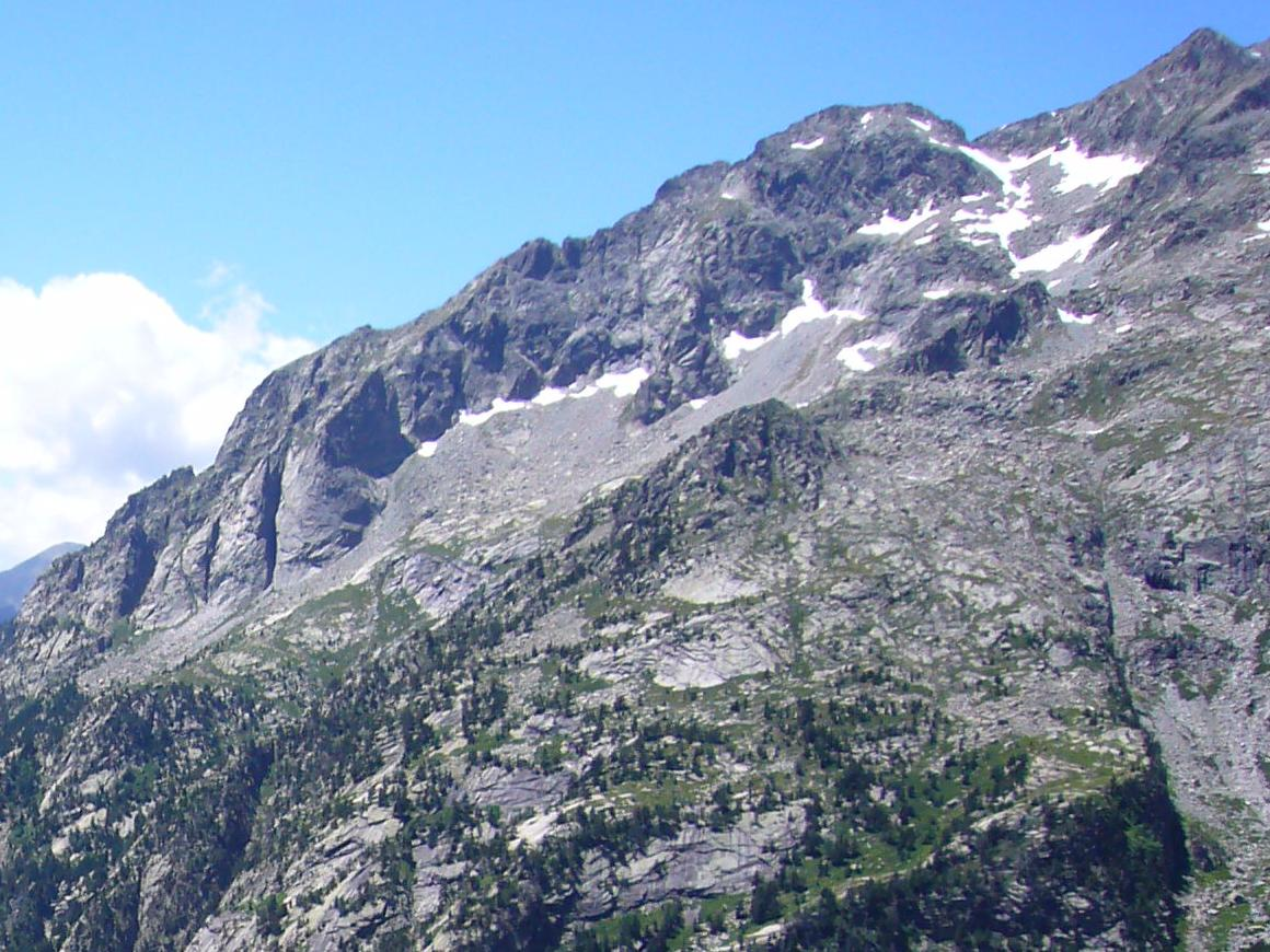 Comalestorres, vista des de l'extrem nord del Barranc de les Llastres; la Vall de Boí, Alta Ribagorça, Catalonia